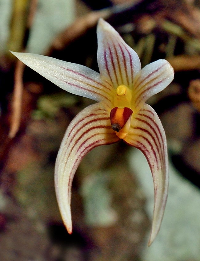 Bulbophyllum affine